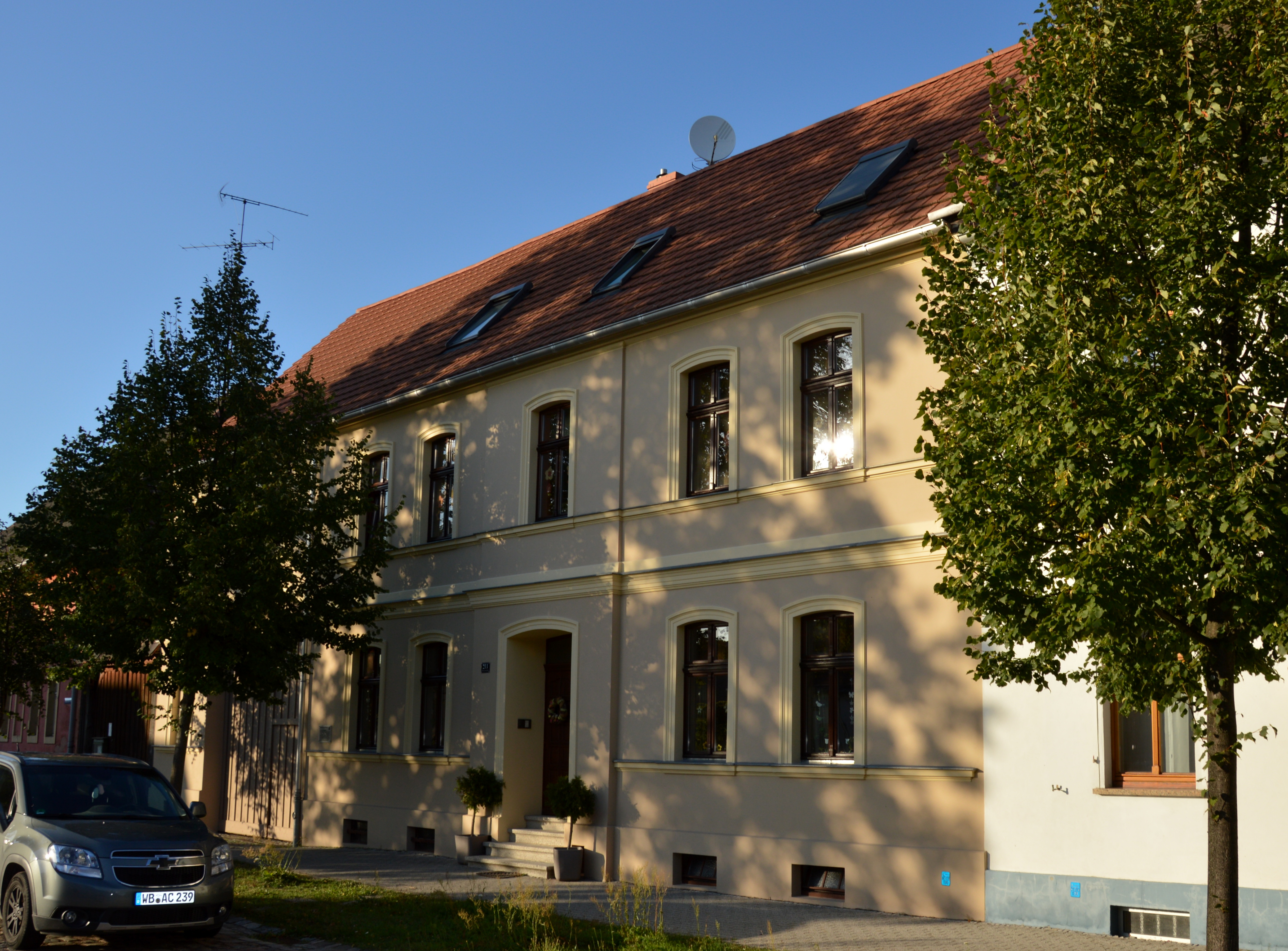 Haus Erdmannsdorfstraße 211 in Wörlitz